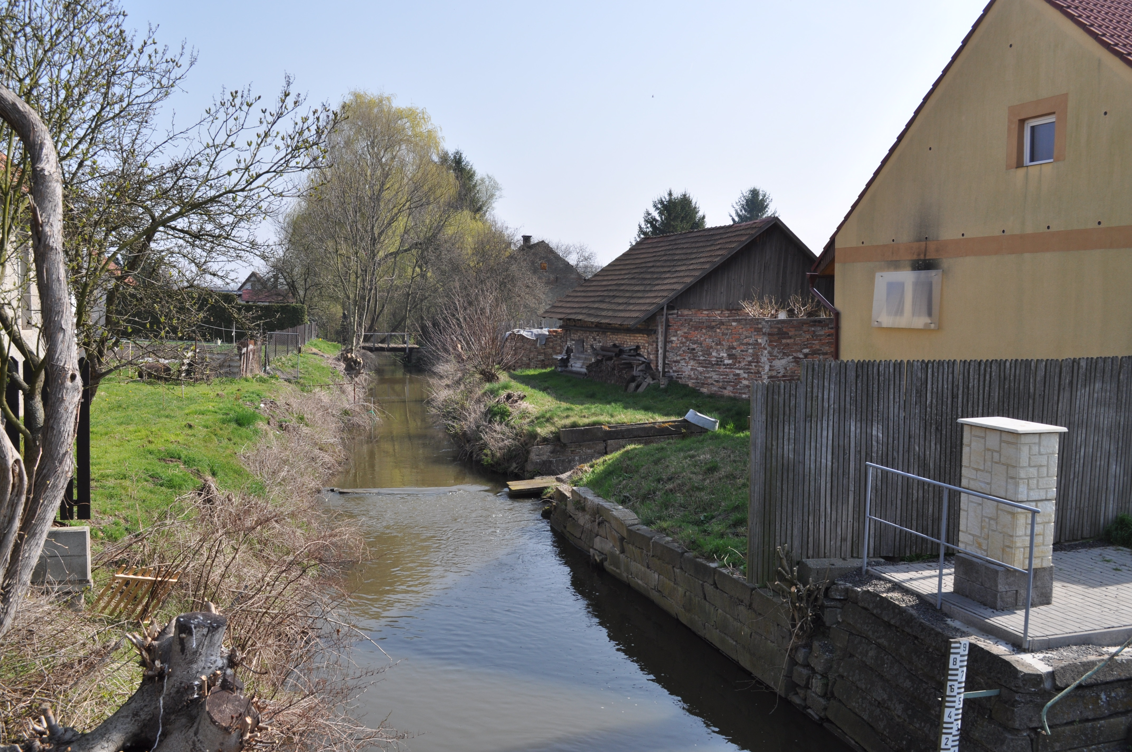 Saaner Kanal in Opolánky